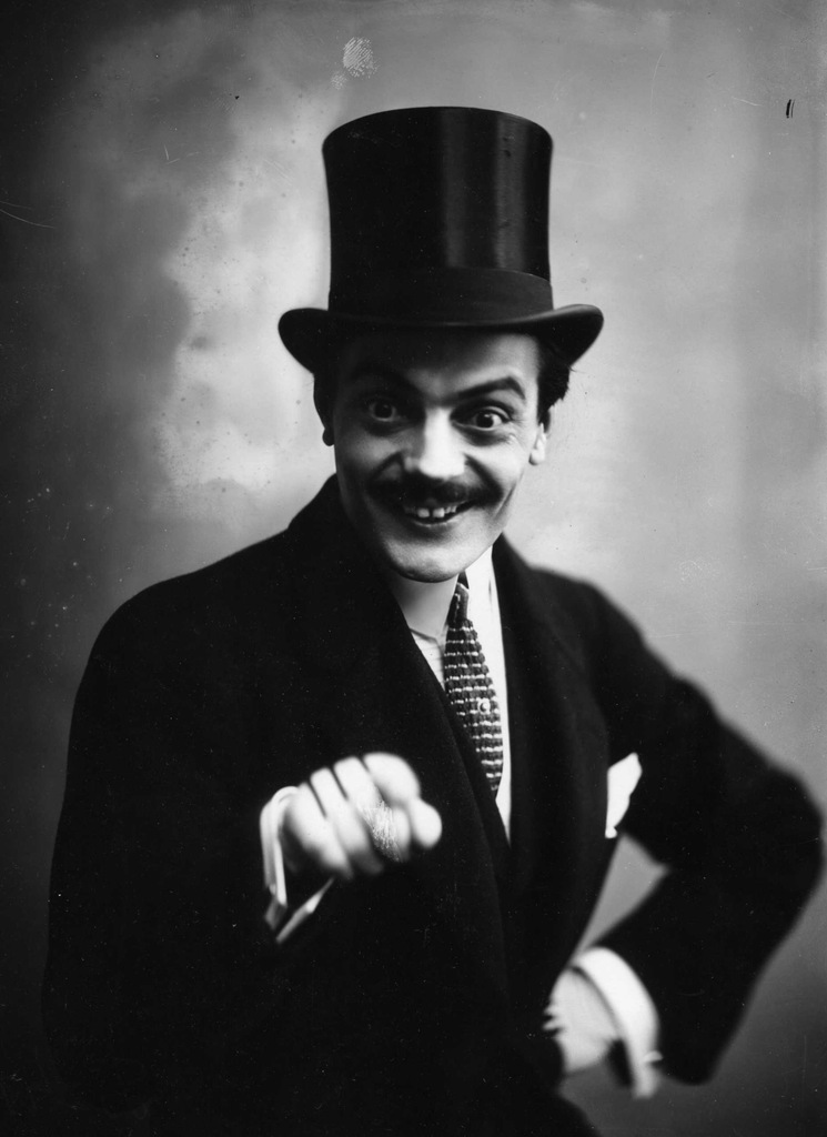 Макс Линдер. Ноябрь 1913, Санкт-Петербург